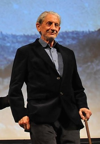 "Libre te Quiero" aurkezpena, Begoña del Teso eta Basilio Martín Patinorekin Presentación de "Libre te Quiero" con Begoña del Teso y Basilio Martín Patino Argazkia / Fotografía: Iñigo Royo